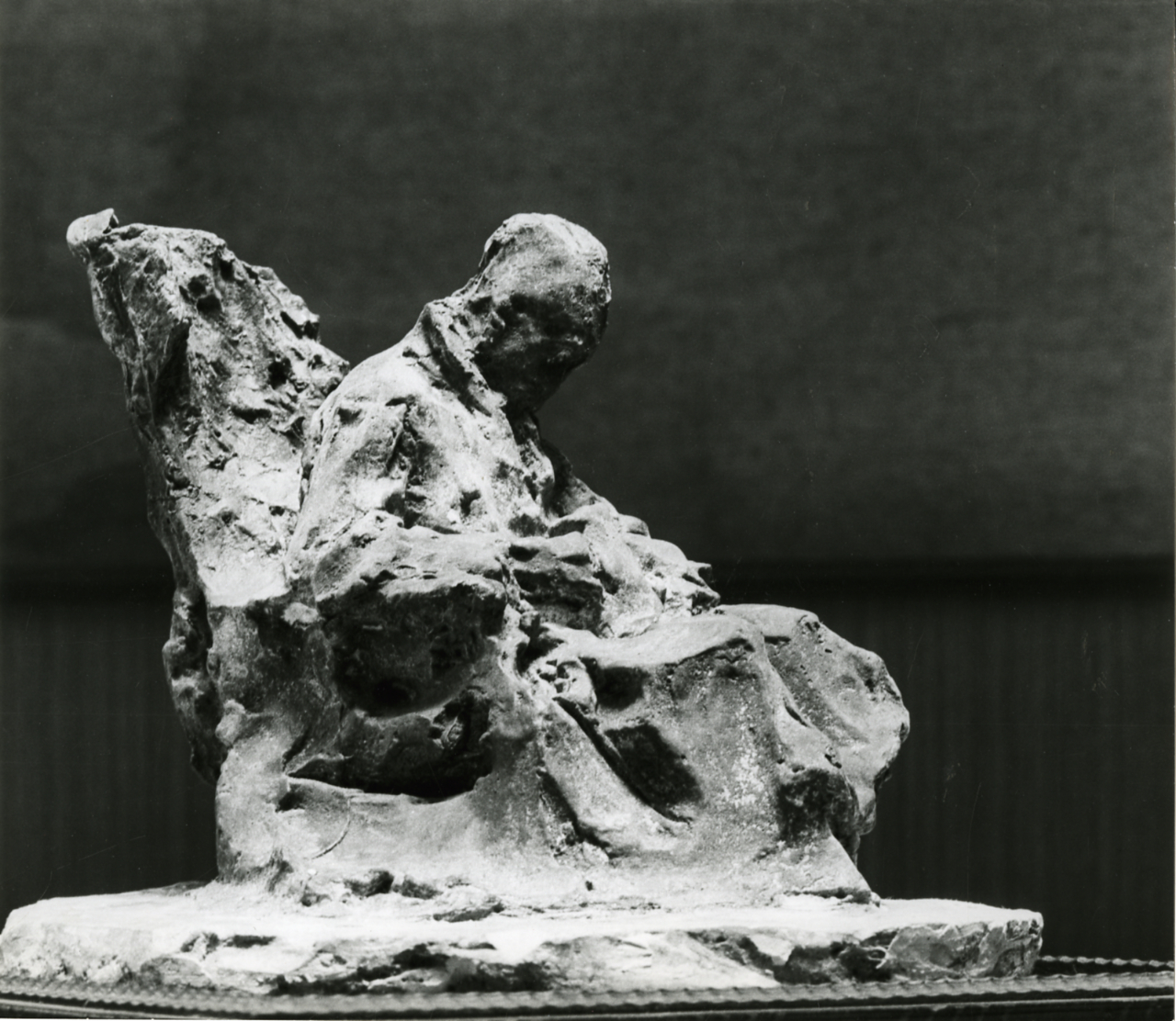 Servizio fotografico : Barzio, 1978 / Paolo Monti. - Stampe: 2 : Positivo b/n, gelatina bromuro d'argento/ carta, 24x30. - ((Al verso delle stampe manoscritto numero di negativo corrispondente: 3000/16, 3170/3. Sul coperchio della scatola manoscritto a pennarello nero: "Medardo Rosso". - Occasione: Documentazione per la pubblicazione del catalogo: "Medardo Rosso, 1858-19" , Ed. Der Kunstverein, 1984. - , presso Archivio Paolo Monti. - Fonte: Agenda di Paolo Monti: Nikon Leika 3001-/ Monti 1978 (1978-1982)